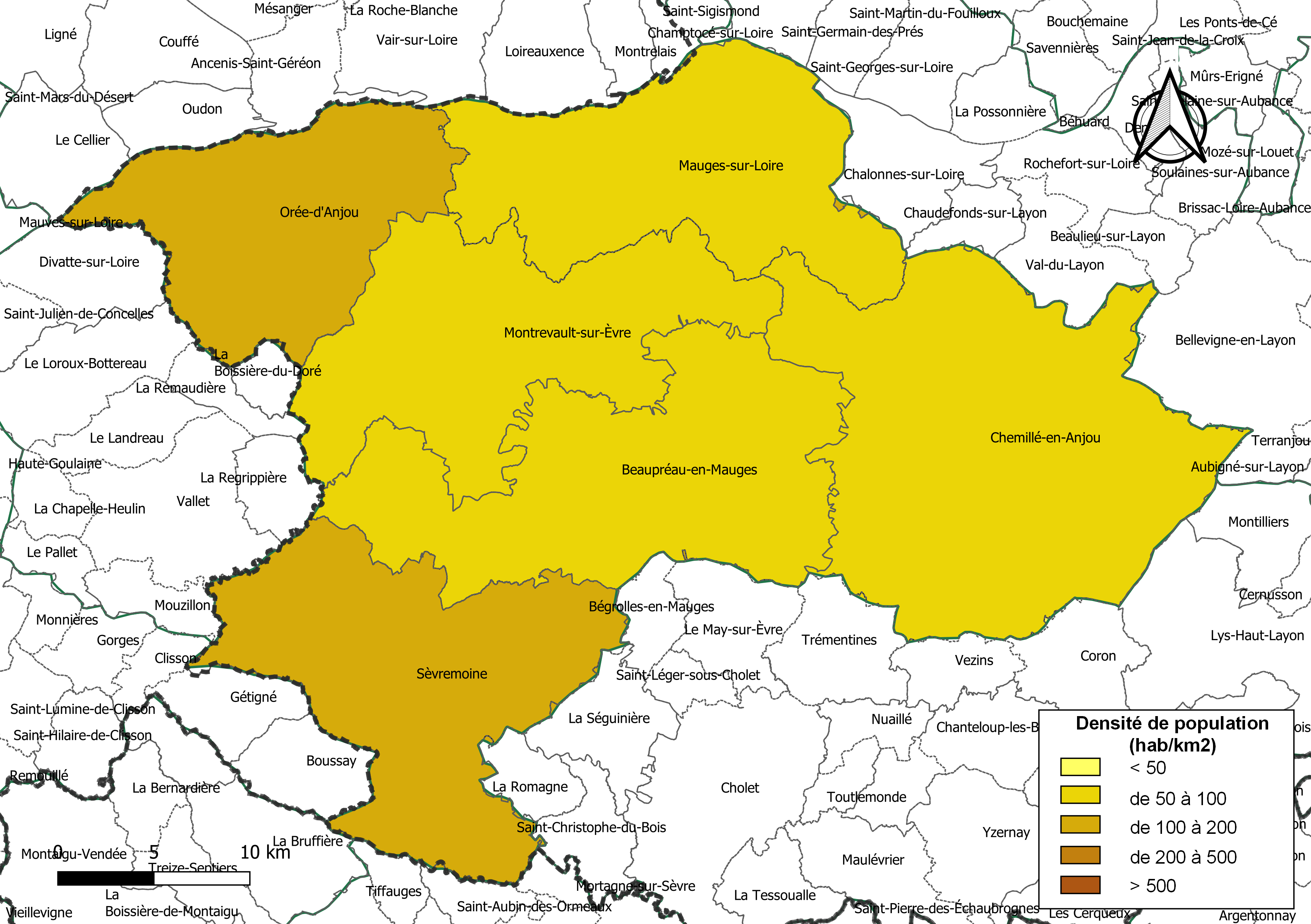 Carte des densités de population (millésimée 2016) des communes de l'intercommunalité Mauges Communauté, département de Maine-et-Loire, France. Composition au 1er janvier 2019.